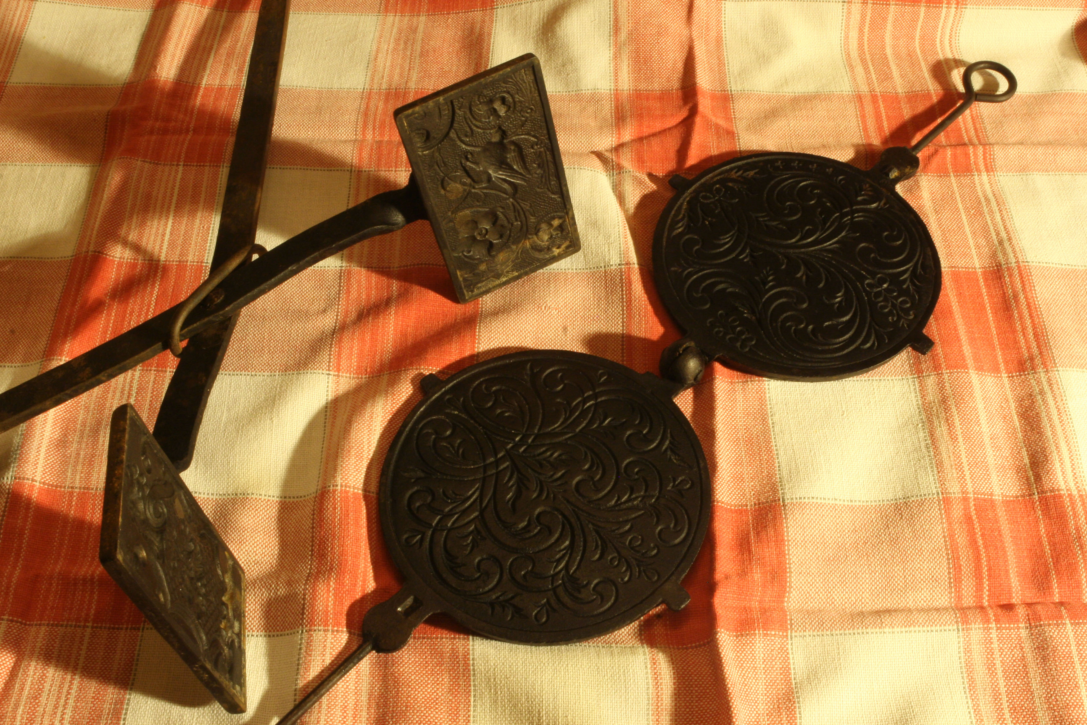 To eksempler på gode råd-jern